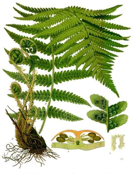 Gewöhnlicher Wurmfarn. A Pflanze mit Rhizom in natürl. Grösse; 1 fruktificirende Blattabschnitte zweiter Ordnung, vergrössert; 2 Querschnitt durch eine Fieder mit einem aus Indusium und Sporangien bestehenden Sorus, desgl.; 3 Intercellularraum mit Drüsen.